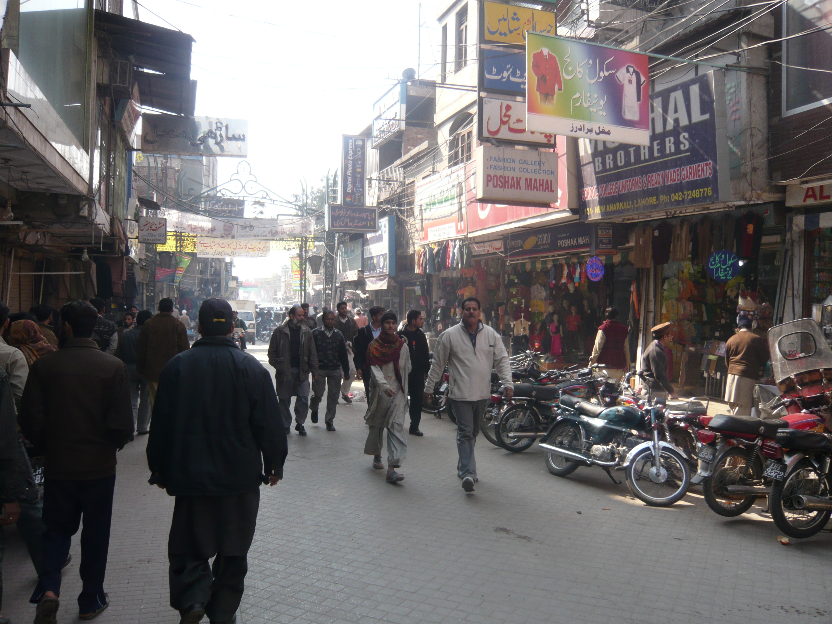 Anarkali, Lahore